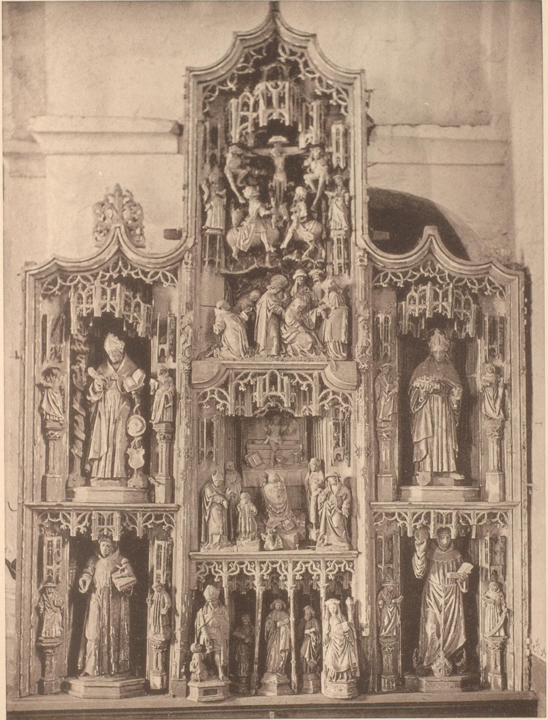 Der Altar der Josefskirche in Kirchlinde um 1890